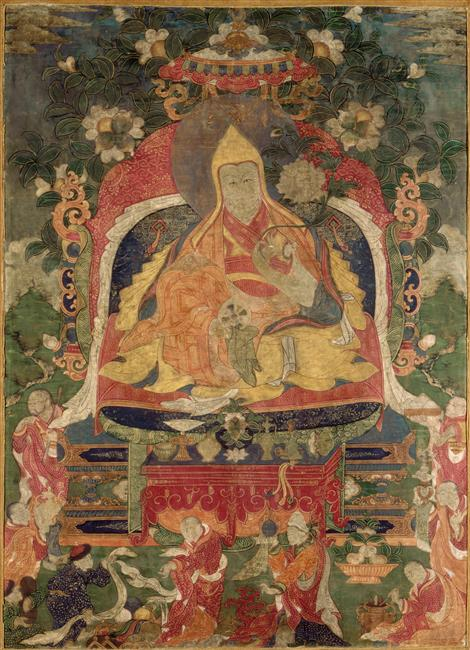 Lozang Gyatso (1617-1682) encore appelé Ngawang Lobsang Gyatso et surnommé « le Grand Cinquième » fut le 5e dalaï-lama. Don du Capitaine Servagnat, 1904